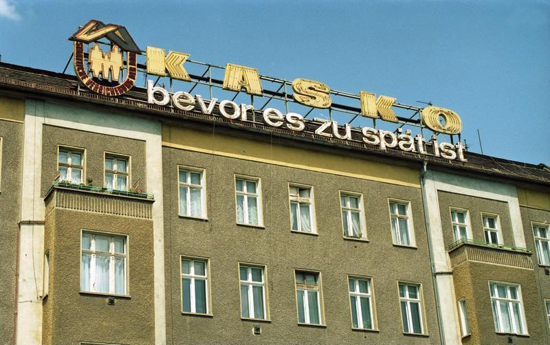 22.7.1991 Berlin, Bezirk Mitte